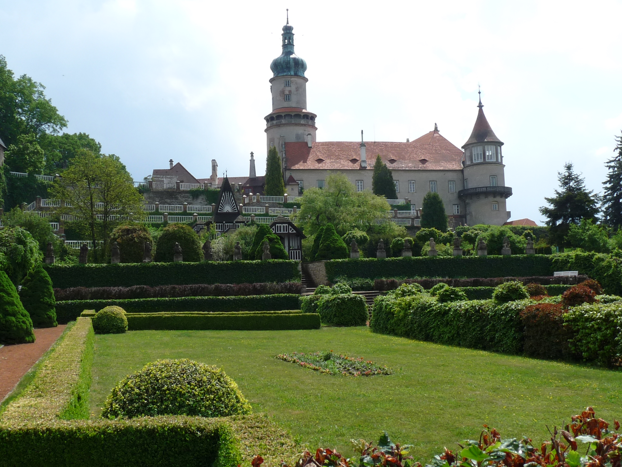 Pohled ze zahrady zámku